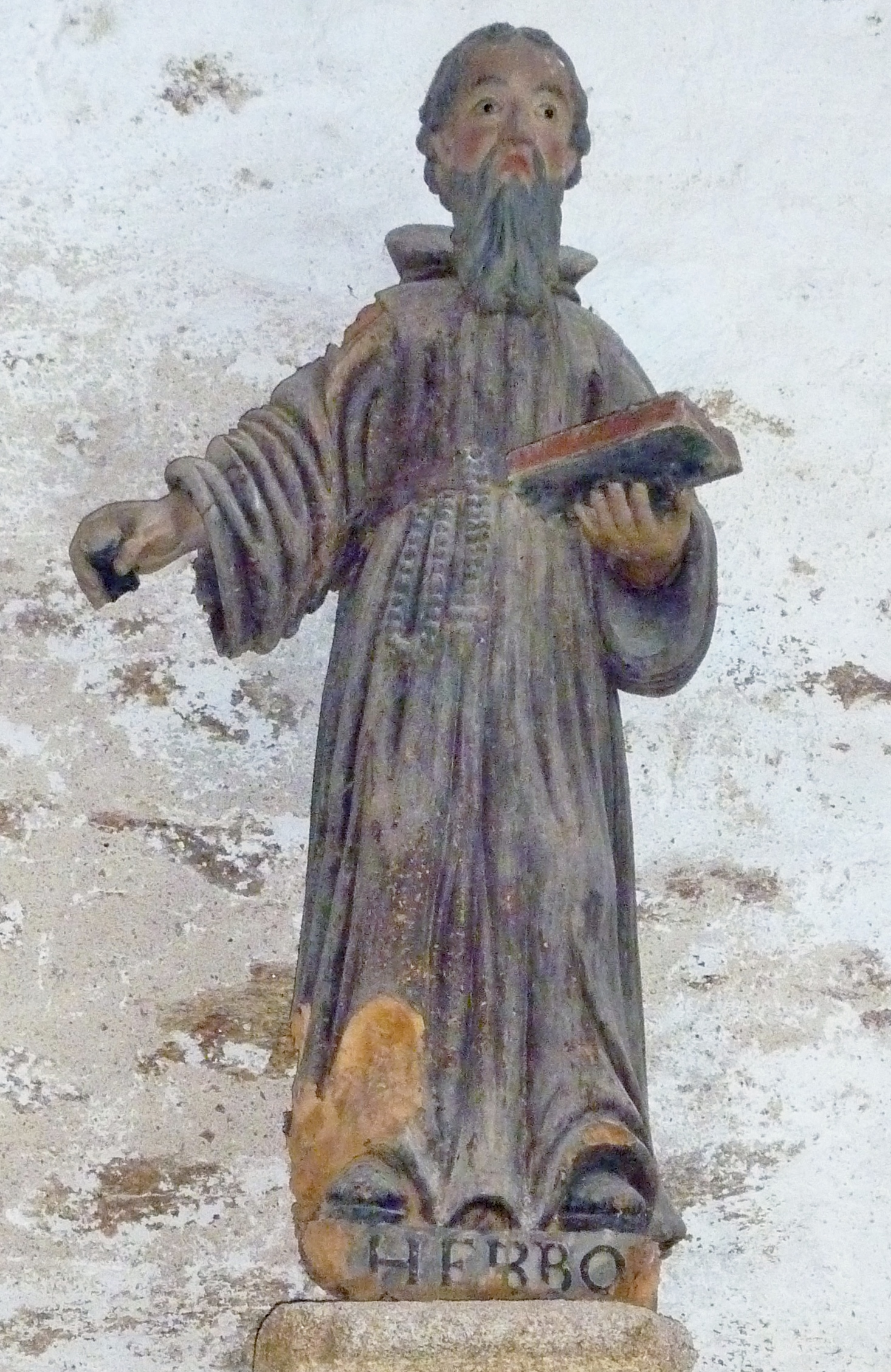 Plonéour-Lanvern : chapelle de Languivoa, statue de saint Herbot. Il tient dans sa main droite du crin de vache ou de cheval, attribut de son pouvoir protecteur sur les animaux.